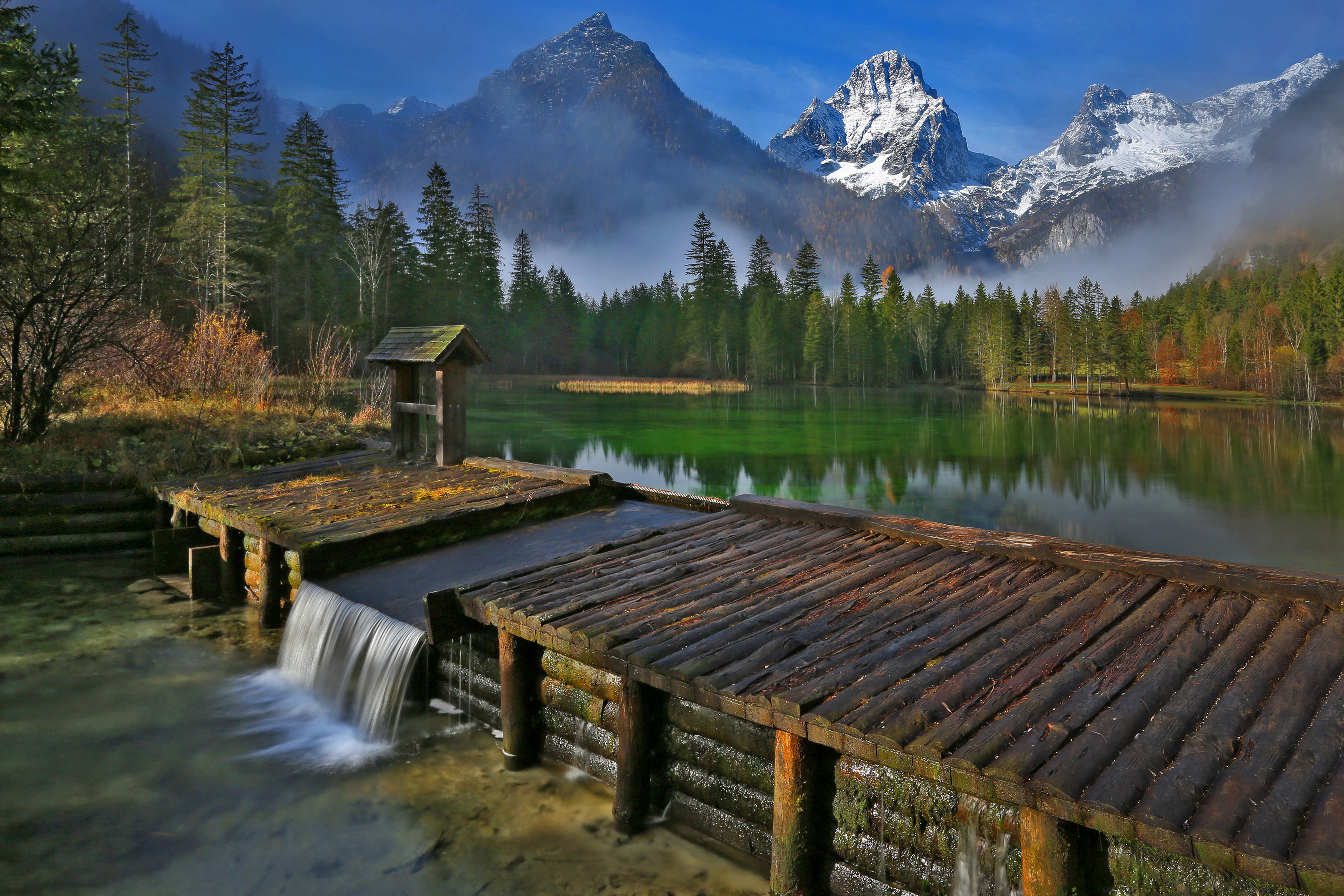 Schiederweiher im Herbst / Hinterstoder Oberösterreich